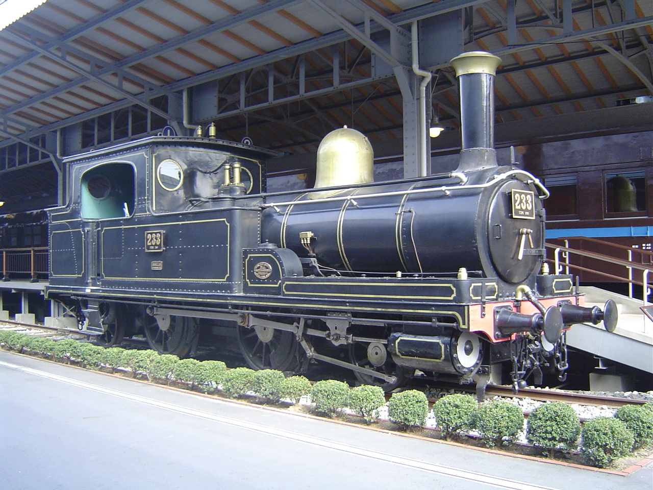 日本国有鉄道230形蒸気機関車（233号） 鉄道科学博物館で撮影